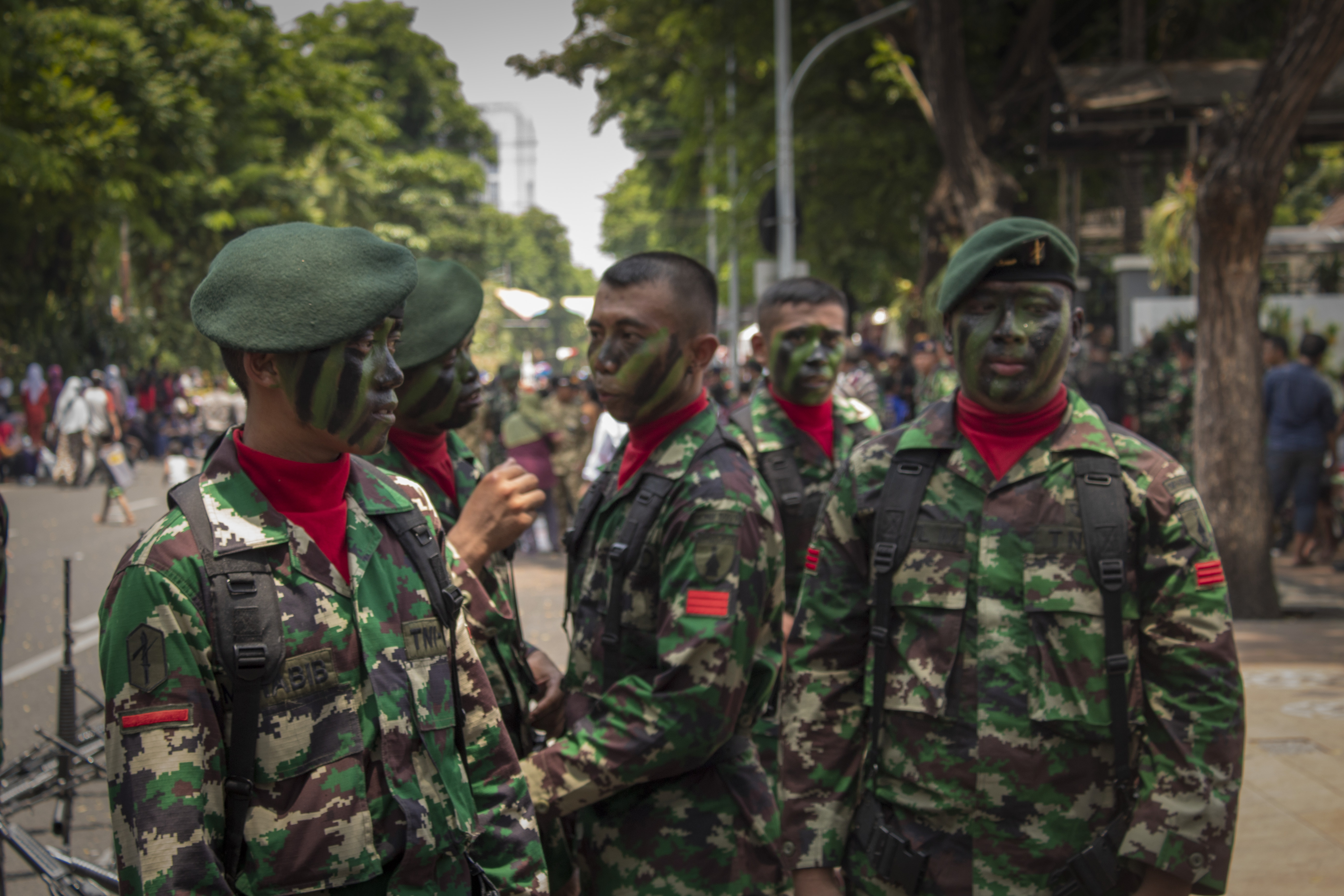 Barisan tantama dari Batalyon Infanteri Raider 500 / Sikatan setelah mengikuti Parade Juang di Taman Bungkul, Surabaya, Jawa Timur pada 11 Nopember 2018